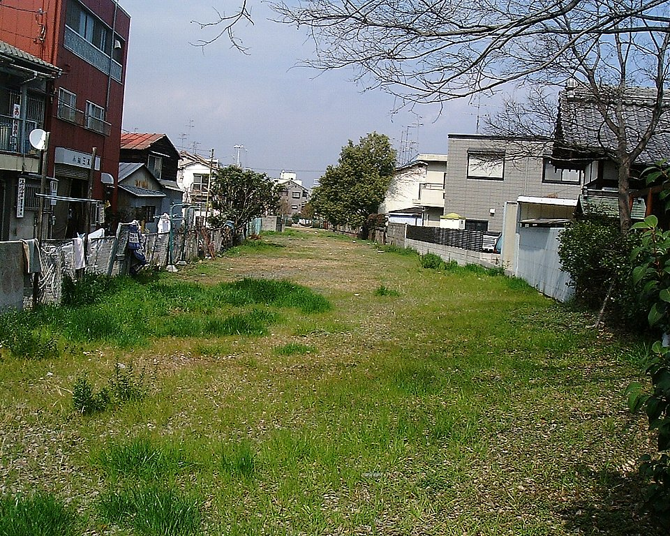 国鉄「尼崎港線」金楽寺駅跡